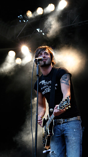 Daniel Kandlbauer am Openair Hochybrig 2006